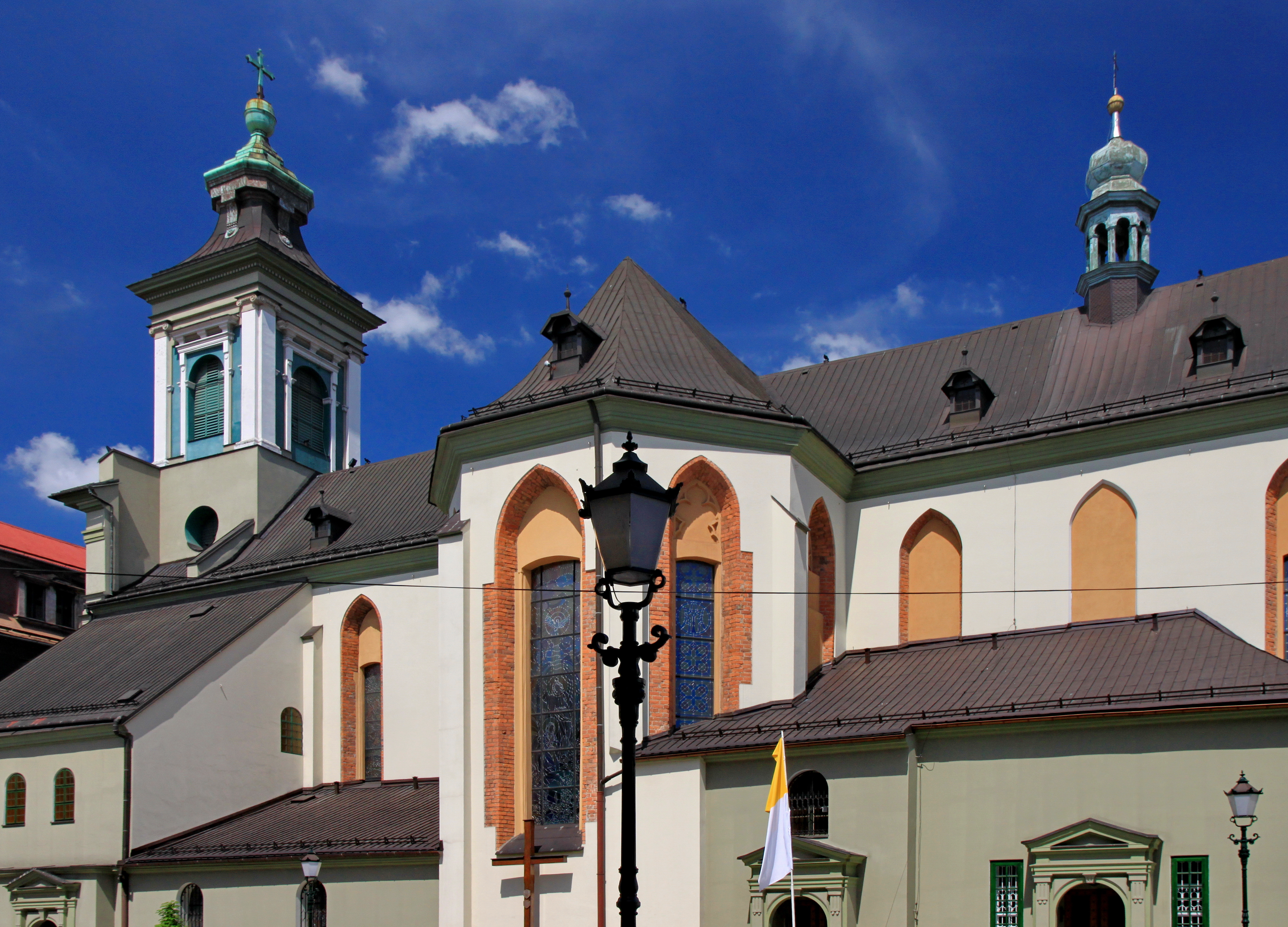 Kościół pod wezwaniem Świętej Marii Magdaleny został wzniesiony w trzynastym wieku dzięki wstawiennictwu książąt piastowskich. Wejście ozdobione jest wczesnogotyckim ostrołukowym portalem. Świątynia została zbudowana na planie krzyża łacińskiego z wydłużonym prezbiterium i krótką nawą połączoną z dwukondygnacyjnym chórem muzycznym. Od północy do nawy przylegają dwie kaplice. W pierwszej zlokalizowano ostrołukowy portal gotycki umieszczony nad wejściem oraz barokowy ołtarz. Natomiast w drugiej kaplicy zlokalizowano duży barokowy krucyfiks. Wnętrze kościoła zdobi późnobarokowy ołtarz główny. Dekoracja jest utrzymana w stylu późnego baroku. W osi nawy poprzecznej wisi kryształowy żyrandol. W uskokach transeptu zachowały się gotyckie służki z rzeźbami figuralnymi.